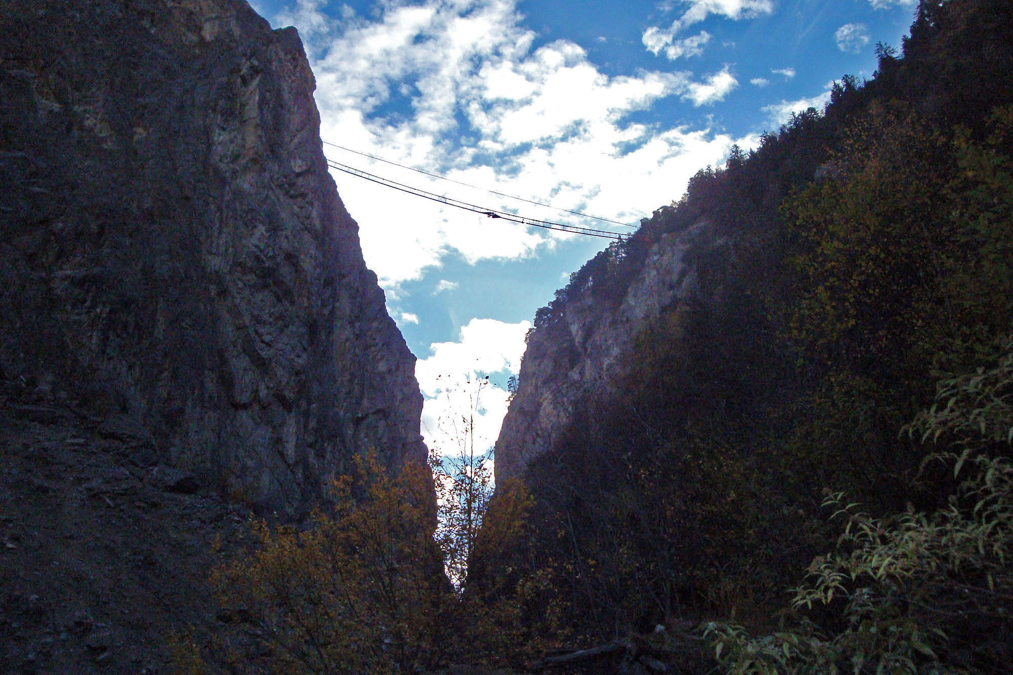 Pont suspendu Niouc